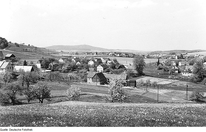 Original image description from the Deutsche Fotothek Steina-Obersteina. Blick vom Windmühlengehöft auf Obersteina